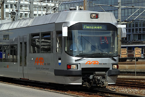 Niederflurtriebzug Be 4/8 der Wynental- und Suhrentalbahn in Aarau